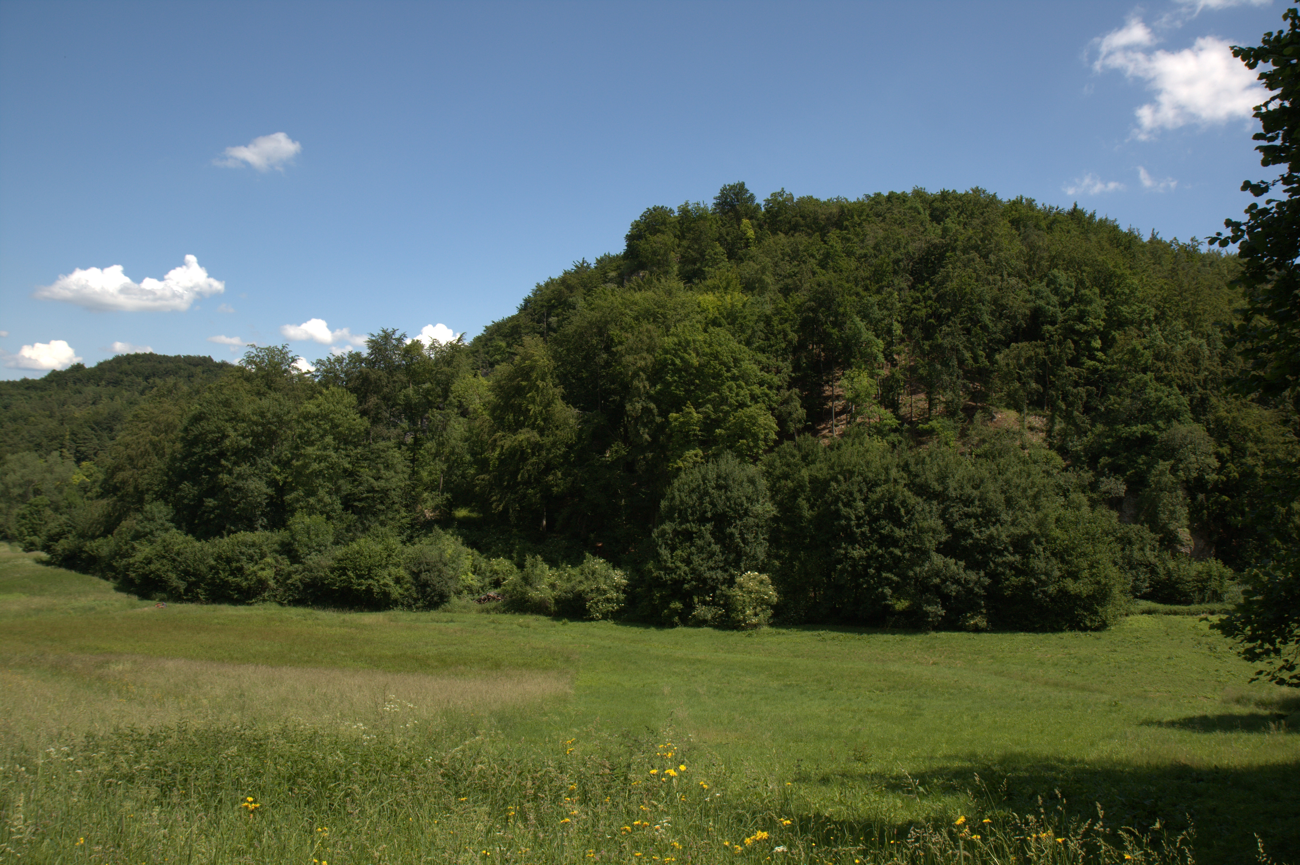 Burgstall Burgstein - Ansicht des Burgsteines aus südlicher Richtung